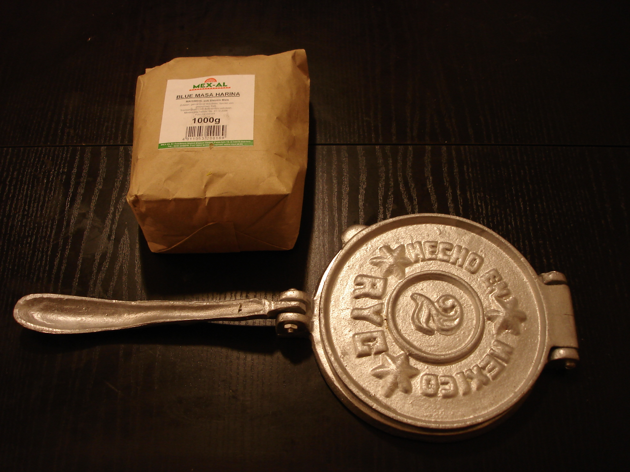 Harina para hacer tortillas y tortillero. El utensilio sirve para hacer los discos planos de masa. La bisagra de la derecha permite que los dos discos se abran para introducir una pieza de masa dentro. Luego se cierra la bisagra y aunque se aplaste la masa, no queda suficientemente delgada, por lo que ahora usamos la bisagra de la izquierda para llevar la pieza de metal sobre los discos y hacer fuerza de palanca para aplanar aún mas la masa, y luego se lleva al fuego. (ver: file:Maricona.svg)